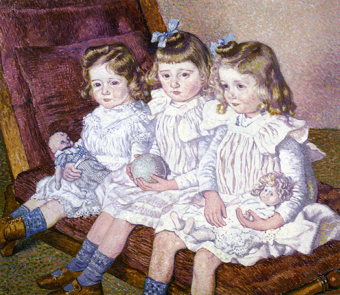 Les trois soeurs; filles de Thomas Braun (fils d'Alexandre Braun) et de Marguerite Van Mons. Portrait d'enfants par Théo Van Rysselberghe (1862-1926)